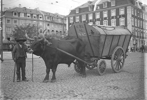 O carro (ou carroça) do lixo…